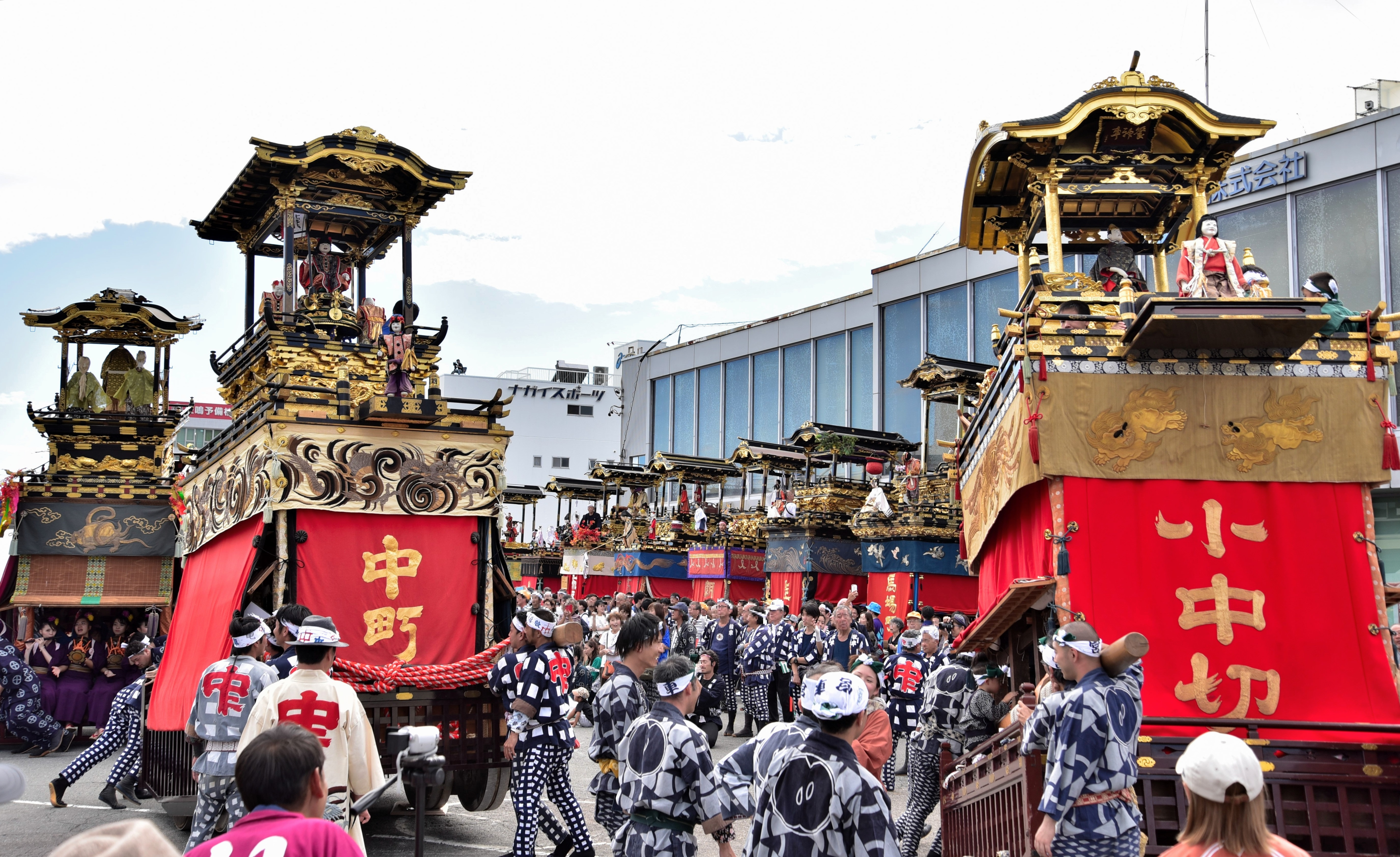 津島駅前での車切 Nikon D750